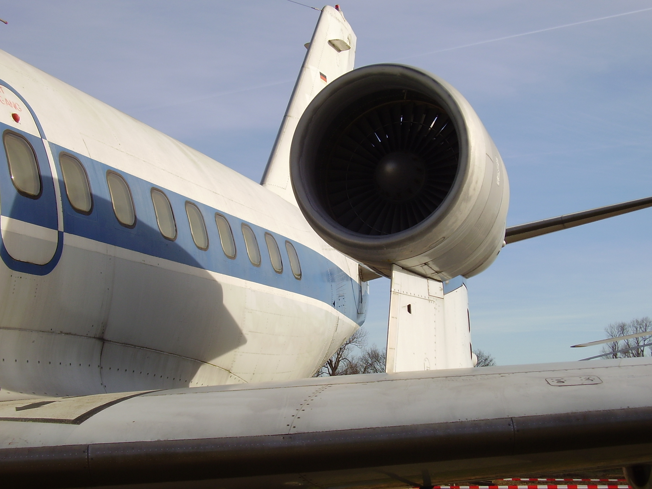 Aeronauticum in Nordholz, Luftschiffe, Zeppelin, bei Cuxhaven, Luftfahrtmuseum